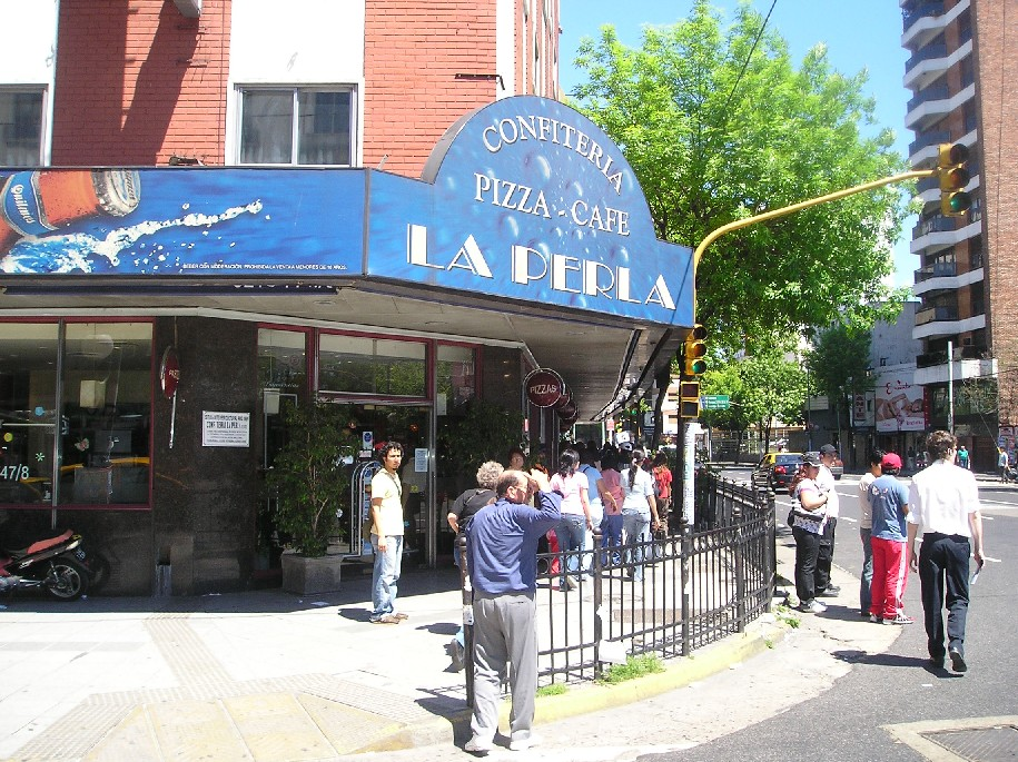 La Perla del Once. Esquina de las avenidas Rivadavia y Jujuy (barrio Once). Buenos Aires. Lugar donde se compuso La Balsa (Litto Nebbia y Tanguito).